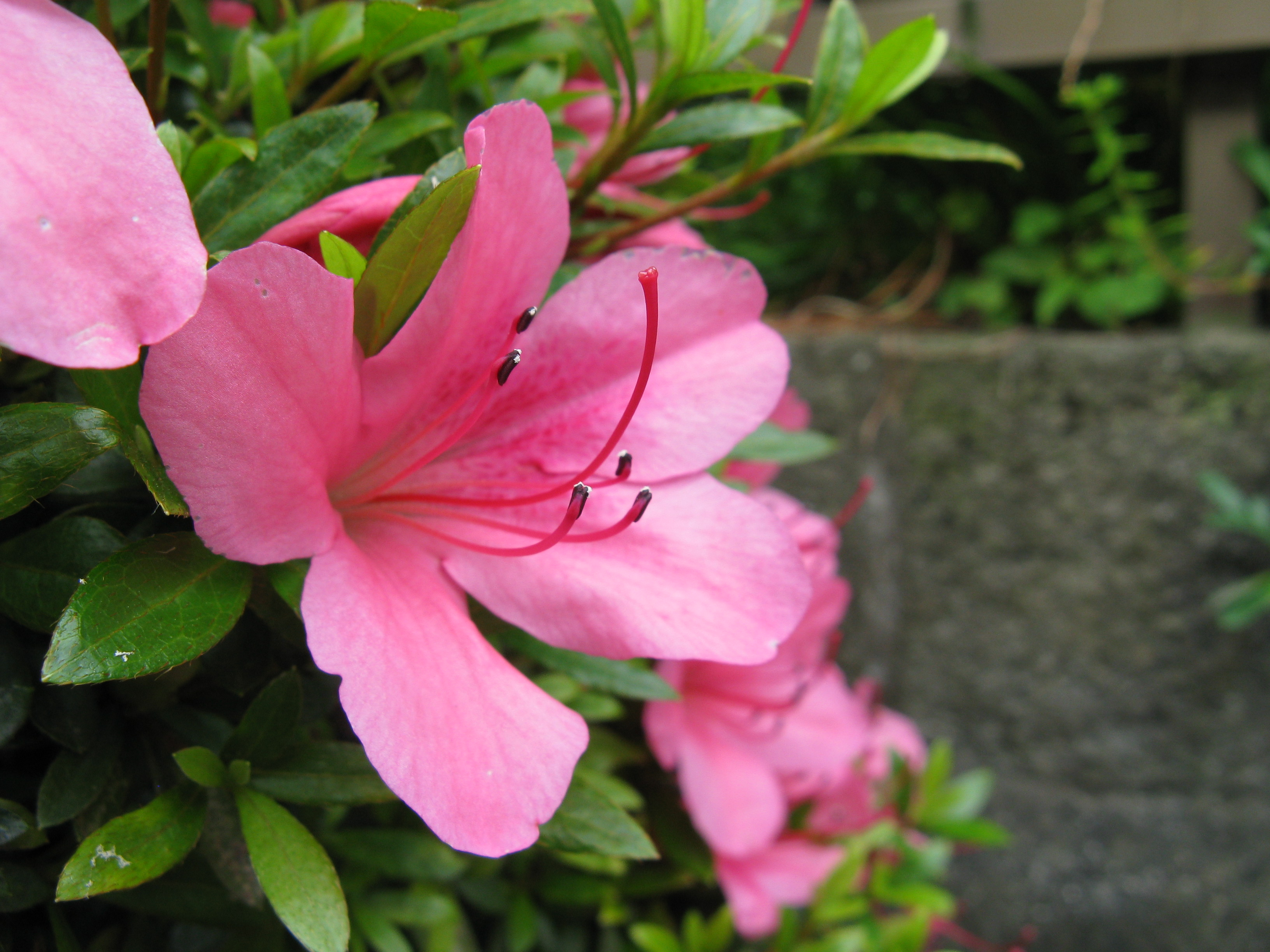 Rhododendron indicum